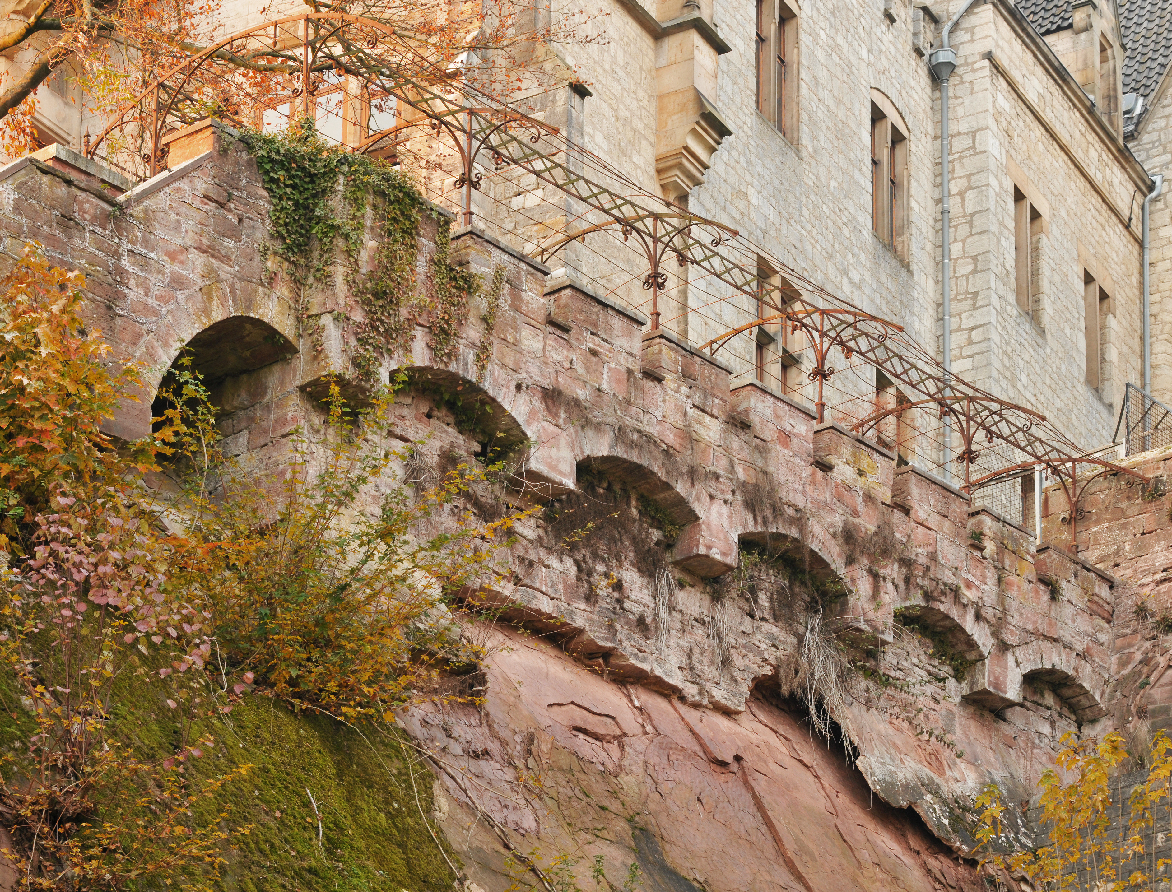 Bauschäden an der Umfassungsmauer von Schloss Marienburg. Die südwestliche Umfassungsmauer hängt über dem abgeblätterten Buntsandsteinhang. Das Schloss Marienburg befindet sich in der Region Hannover, Niedersachsen, Deutschland.